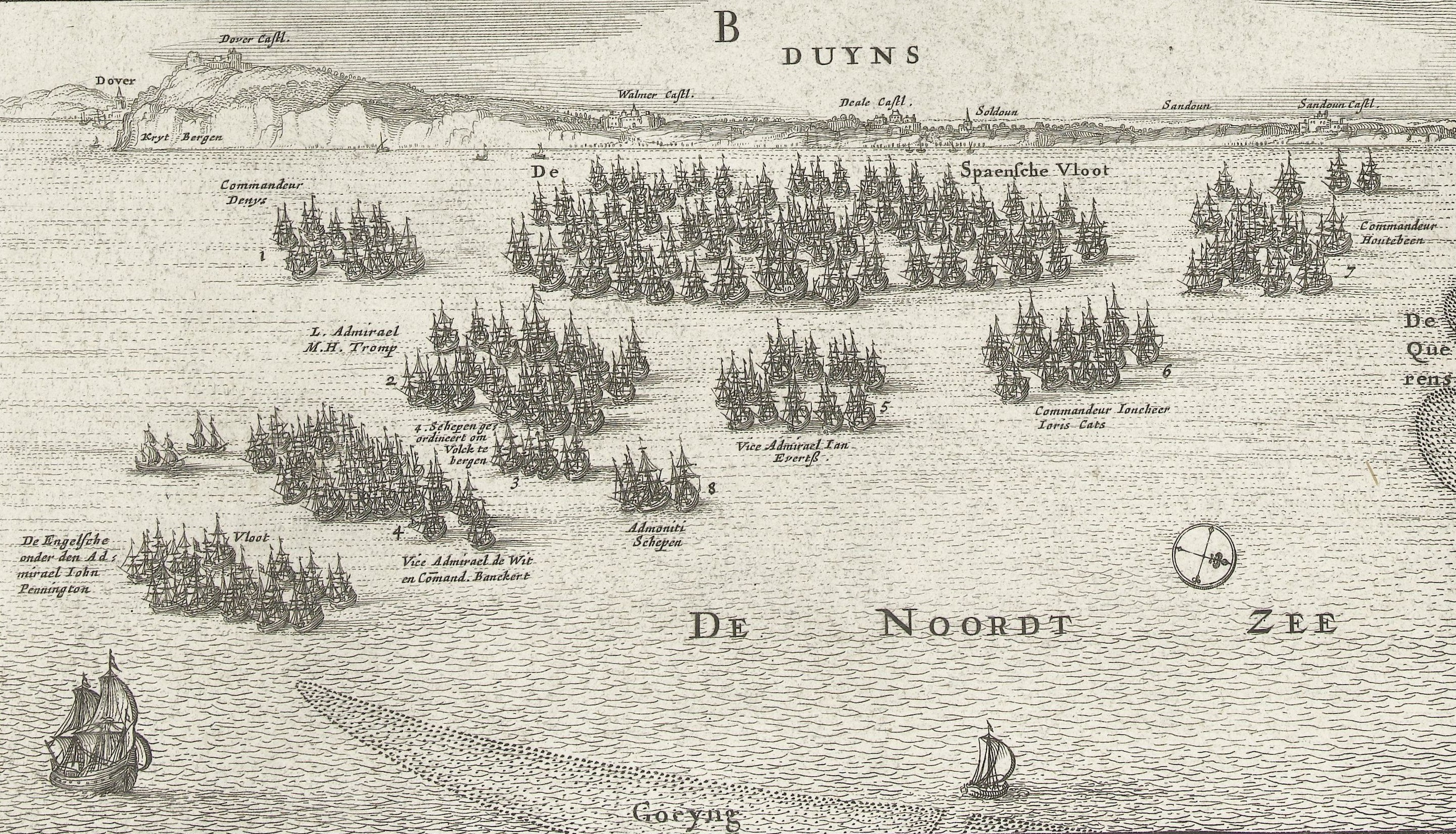 De grote zeeslag bij Duins (plaat 1), 1639, Claes Jansz. Visscher (II) (atelier van), 1640 - 1643 - Rijksmuseum